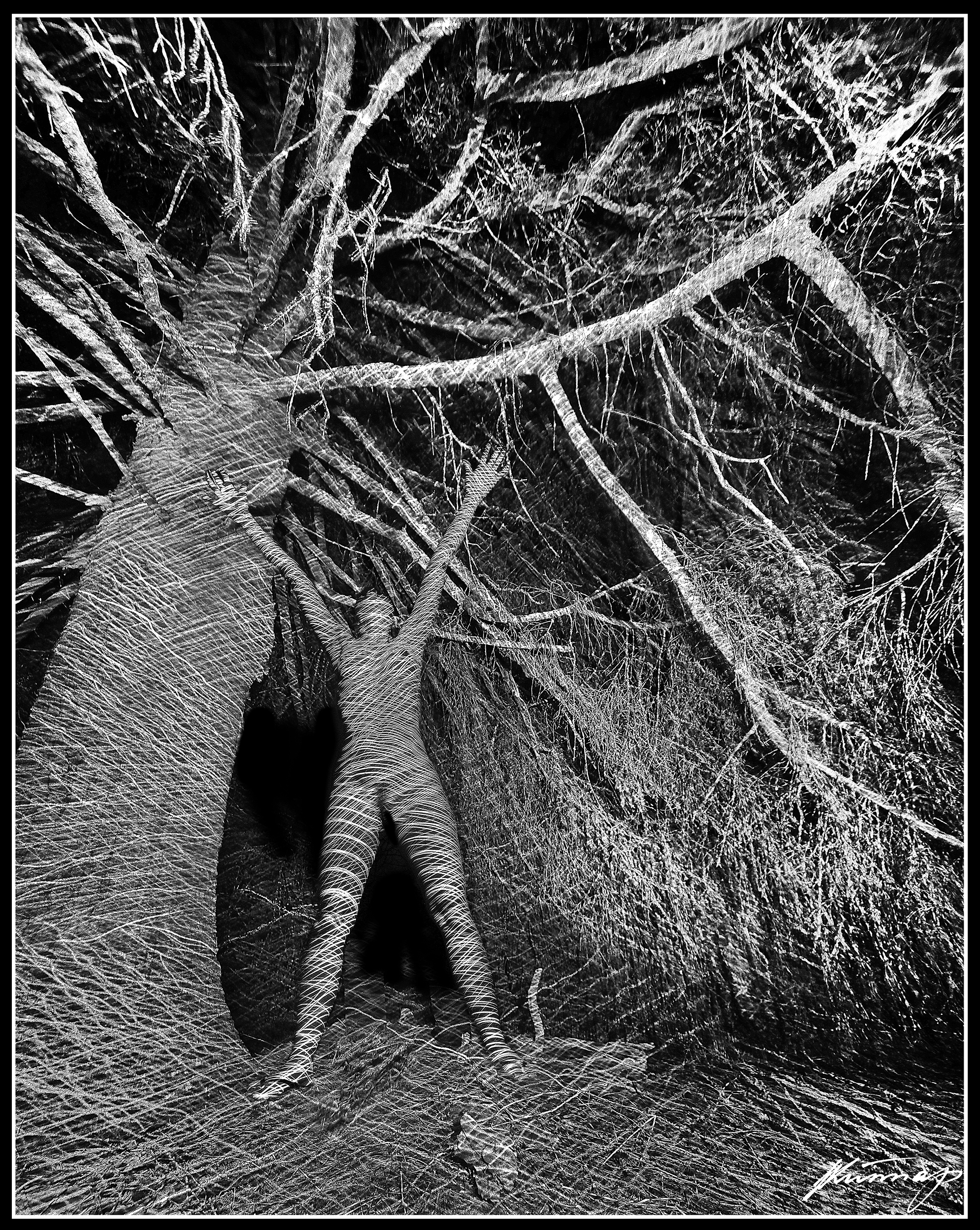 Gravüür valgusega X. Valgus taskulambiga.